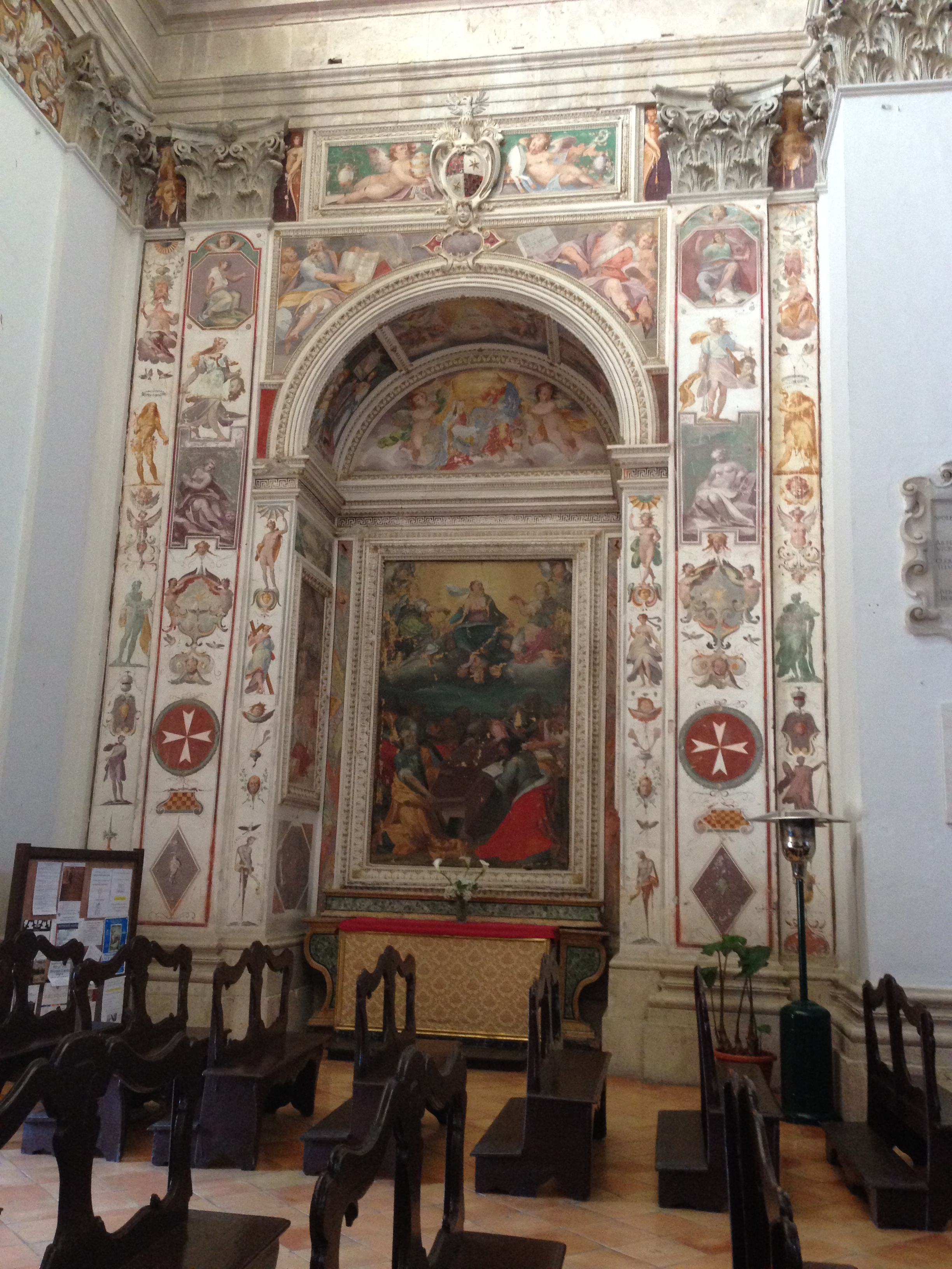 Spoleto. Santuario della Madonna di Loreto, Cappella dell'Assunta